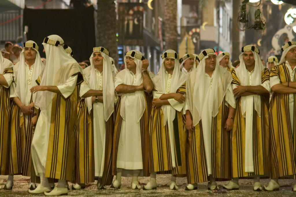 Escuadra Aladins el dia de la Entrada 2006 - Comparsa Saudites d'Ontinyent